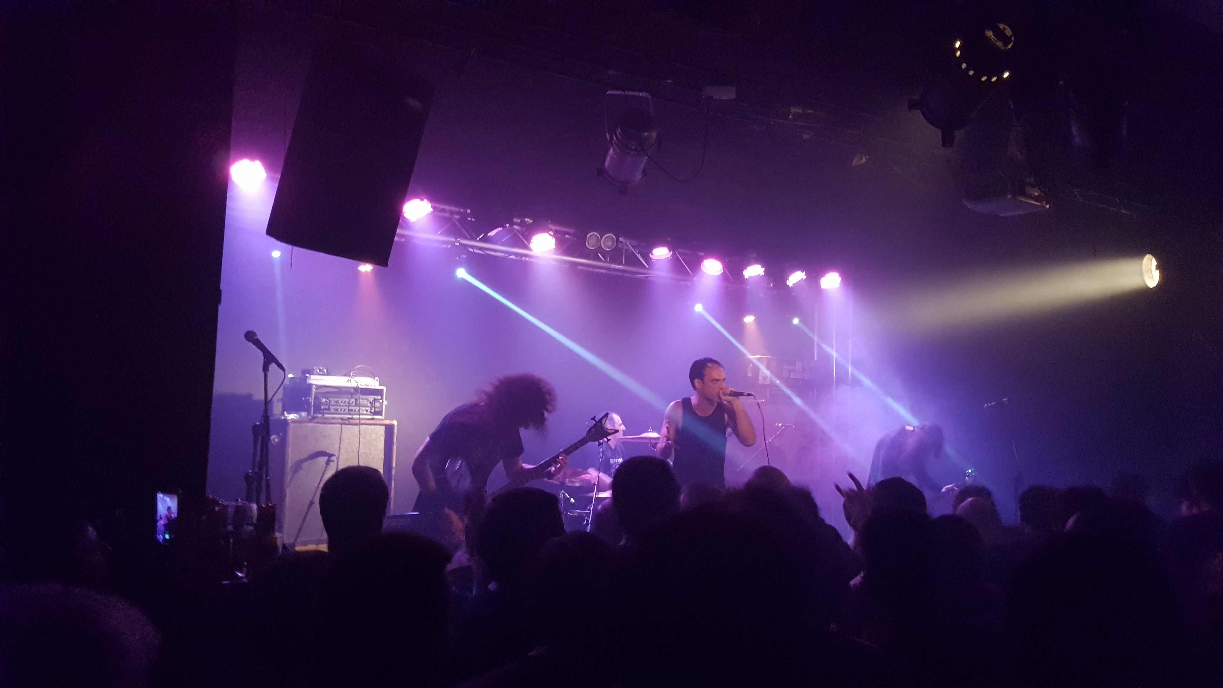 Anestesia taldeak "Gorrotoaren ahotsa 25 urte 1993/2018" biraren barruan 2018-11-03an Donostiako Kafe Antzokian emandako kontzertuko argazkia